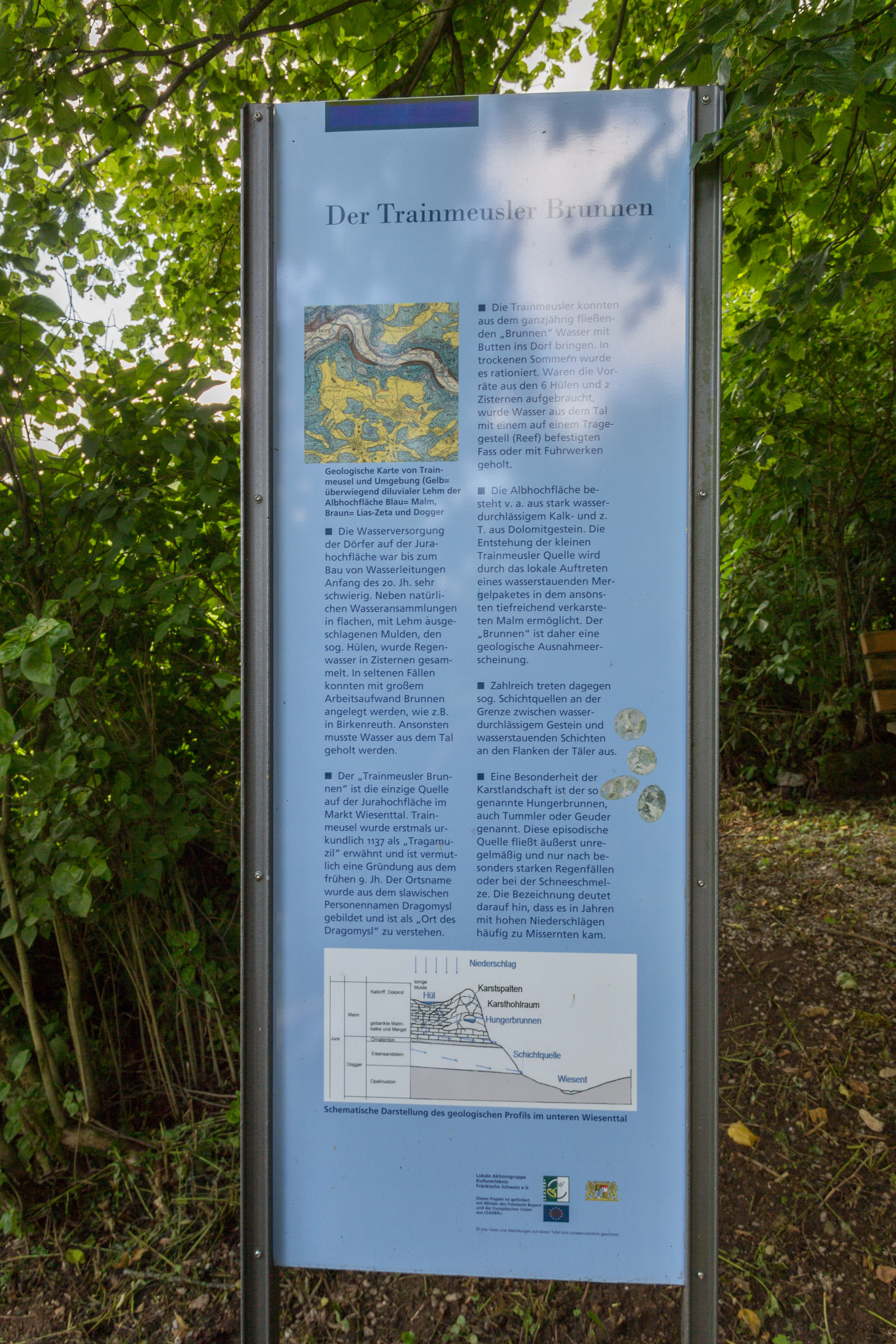 Trainmeuseler Brunnen, Schichtquelle, Naturdenkmal, Naturpark und Landschaftsschutzgebiet Fränkische Schweiz-Veldensteiner Forst